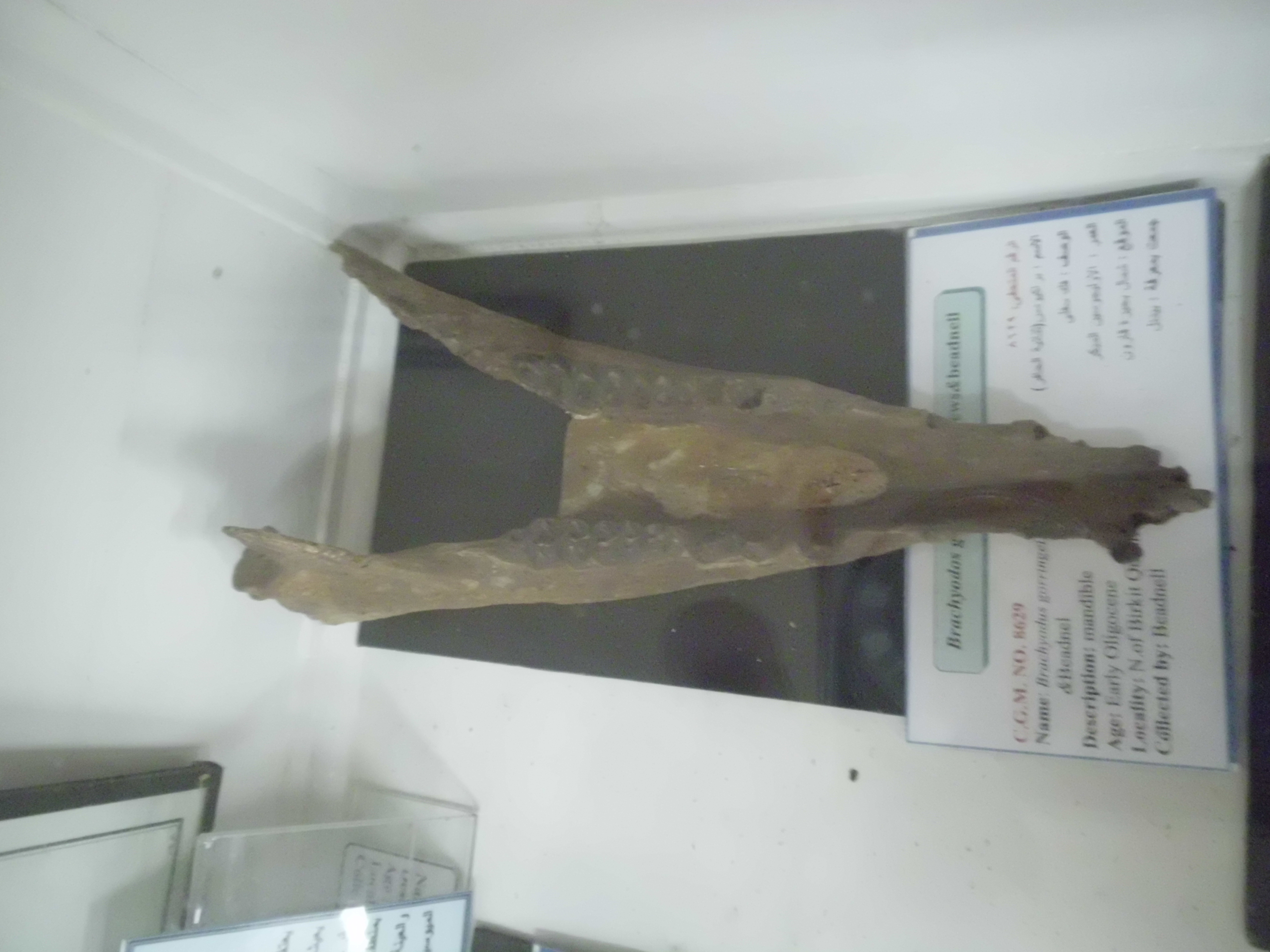 فك سفلي لحيوان براكيودس (ثنائي الحافر) من عصر الاوليجوسين المبكر في شمال بحيرة قارون